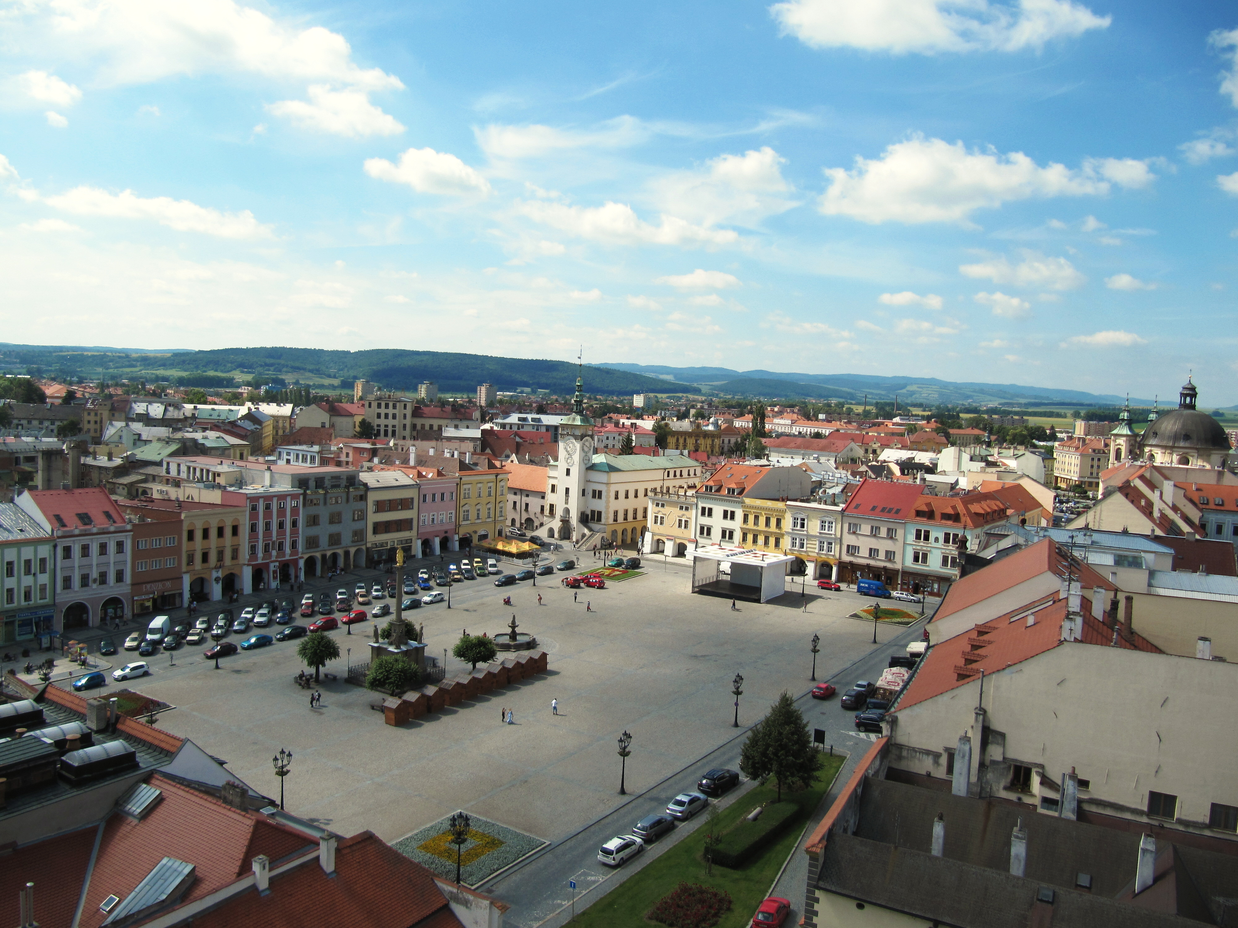 Kroměříž, pohled z věže zámku